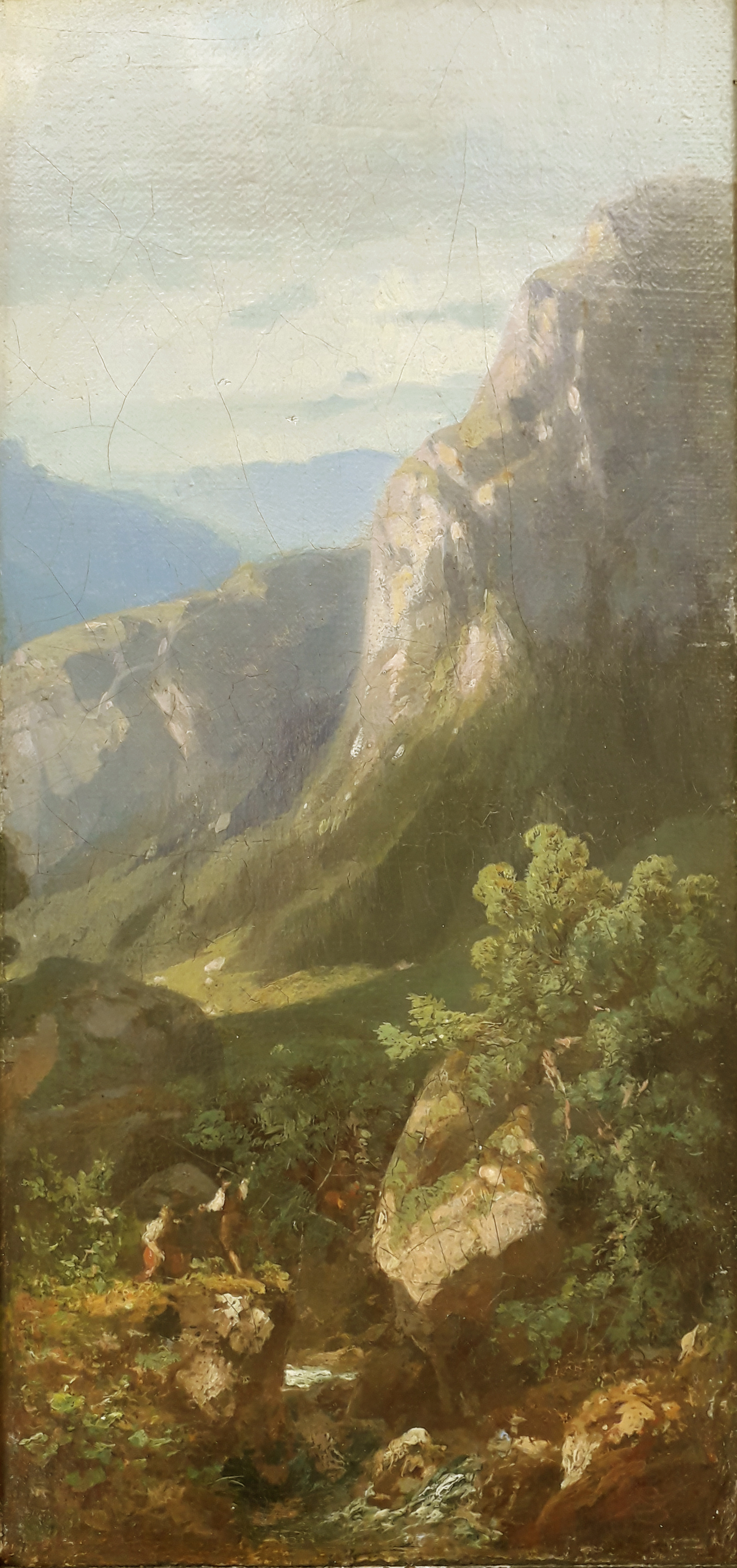 Am Gebirgsbach: 2 fischende Kinder in Gebirgslandschaft, Rauten-Signatur rechts unten